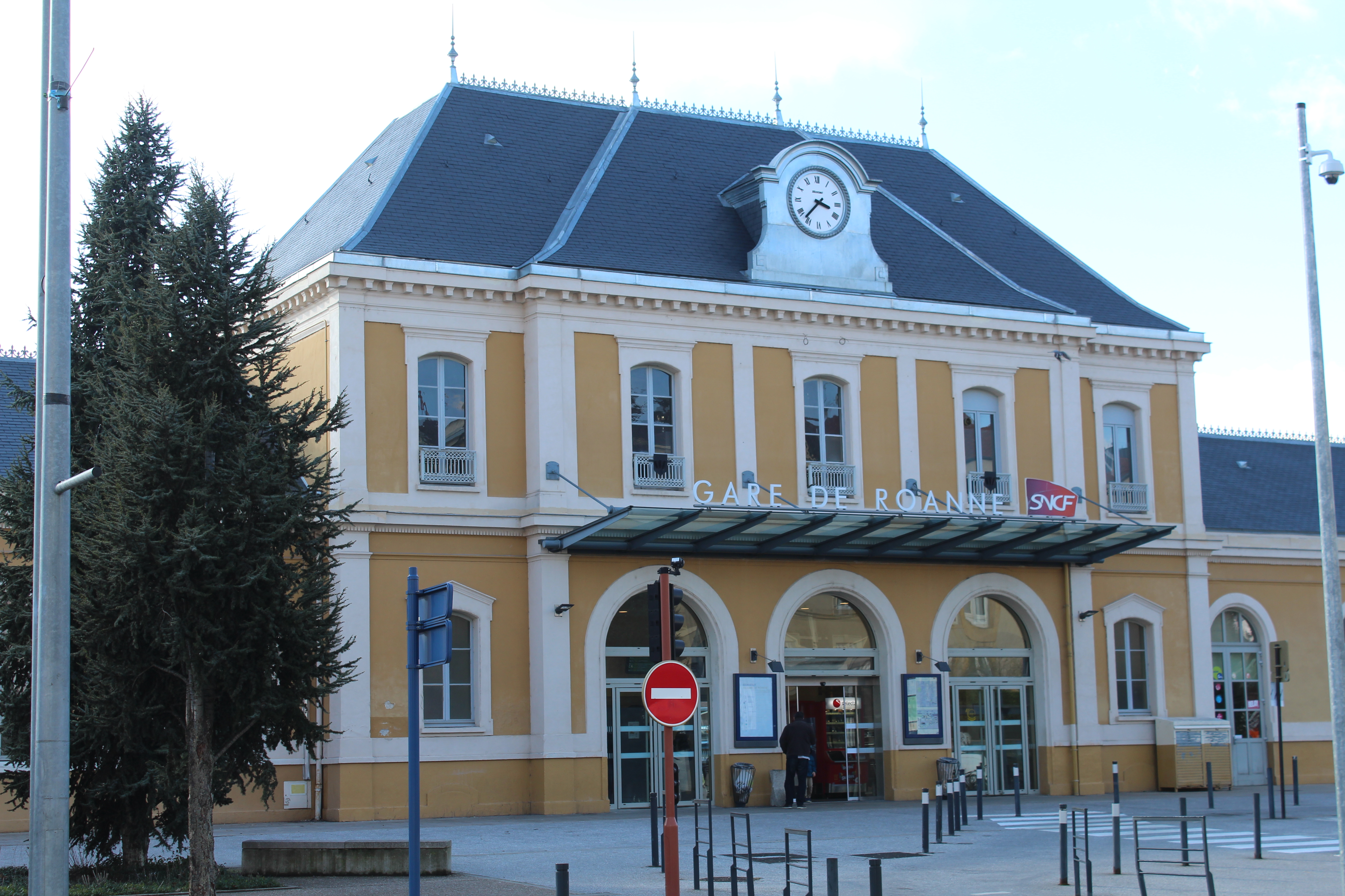 Gare de Roanne.